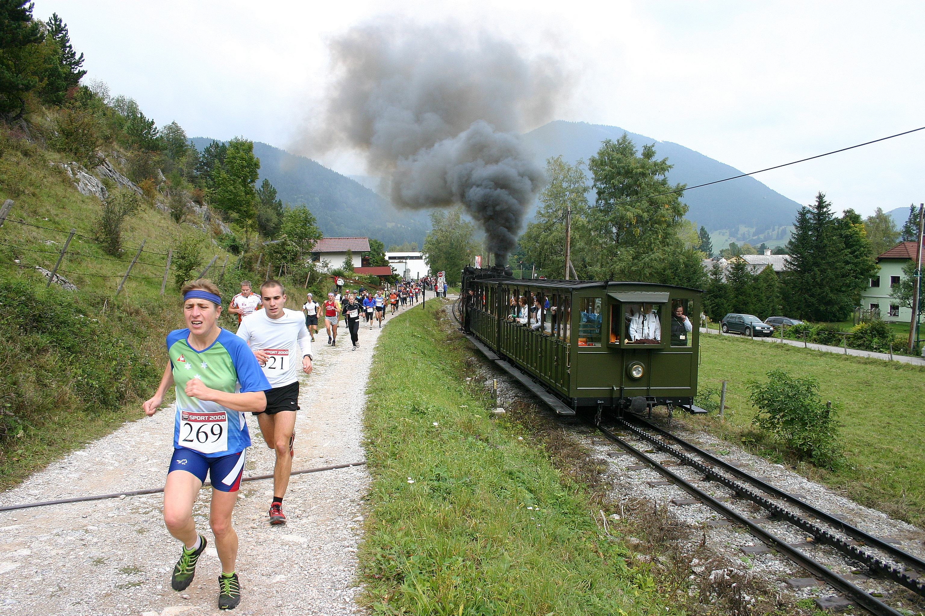 Schneeberglauf 2008 von Puchberg am Schneeberg auf den Hochschneeberg (Bild 1)